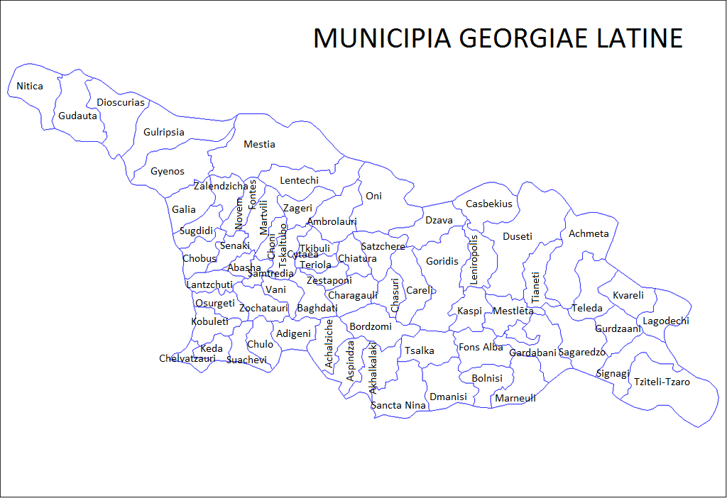 Municipia Georgiae.